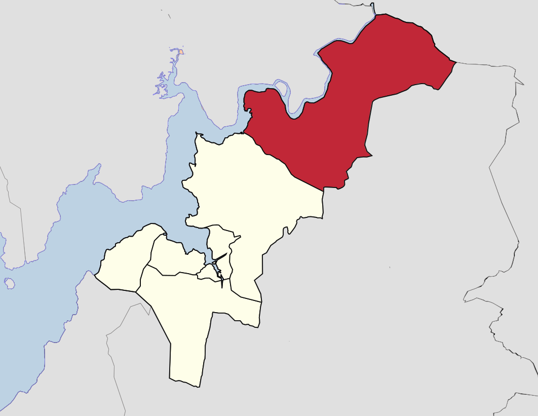 Parroquia de Santa María de Roo en Noia